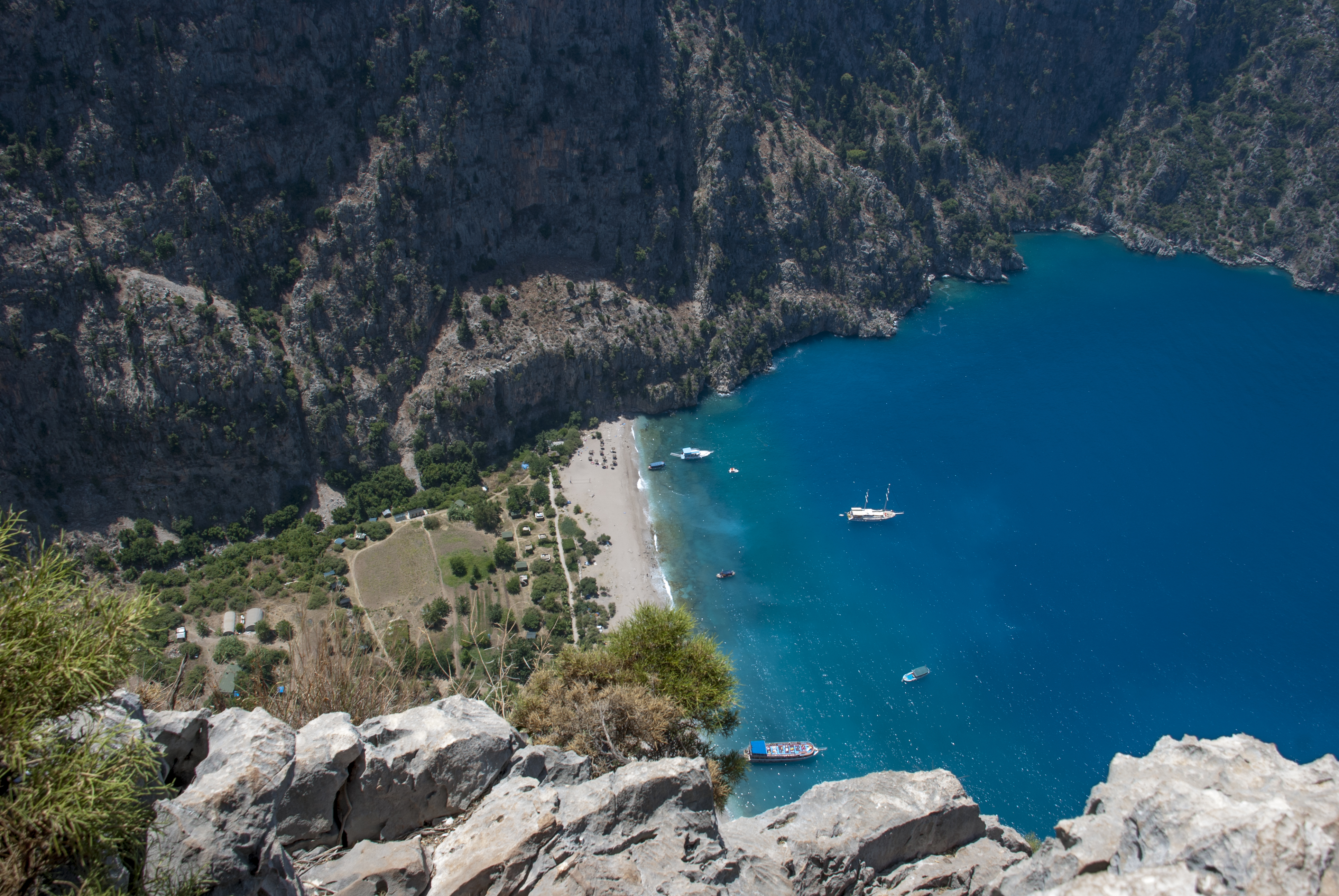 Muğla, Ölüdeniz yakınlarındaki Belçeğiz Körfezi kıyısında Kelebekler Vadisi